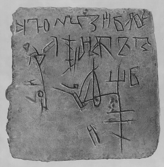 Графіті на шиферній дошці з церкви святого Василія Великого, Володимир на Волині.